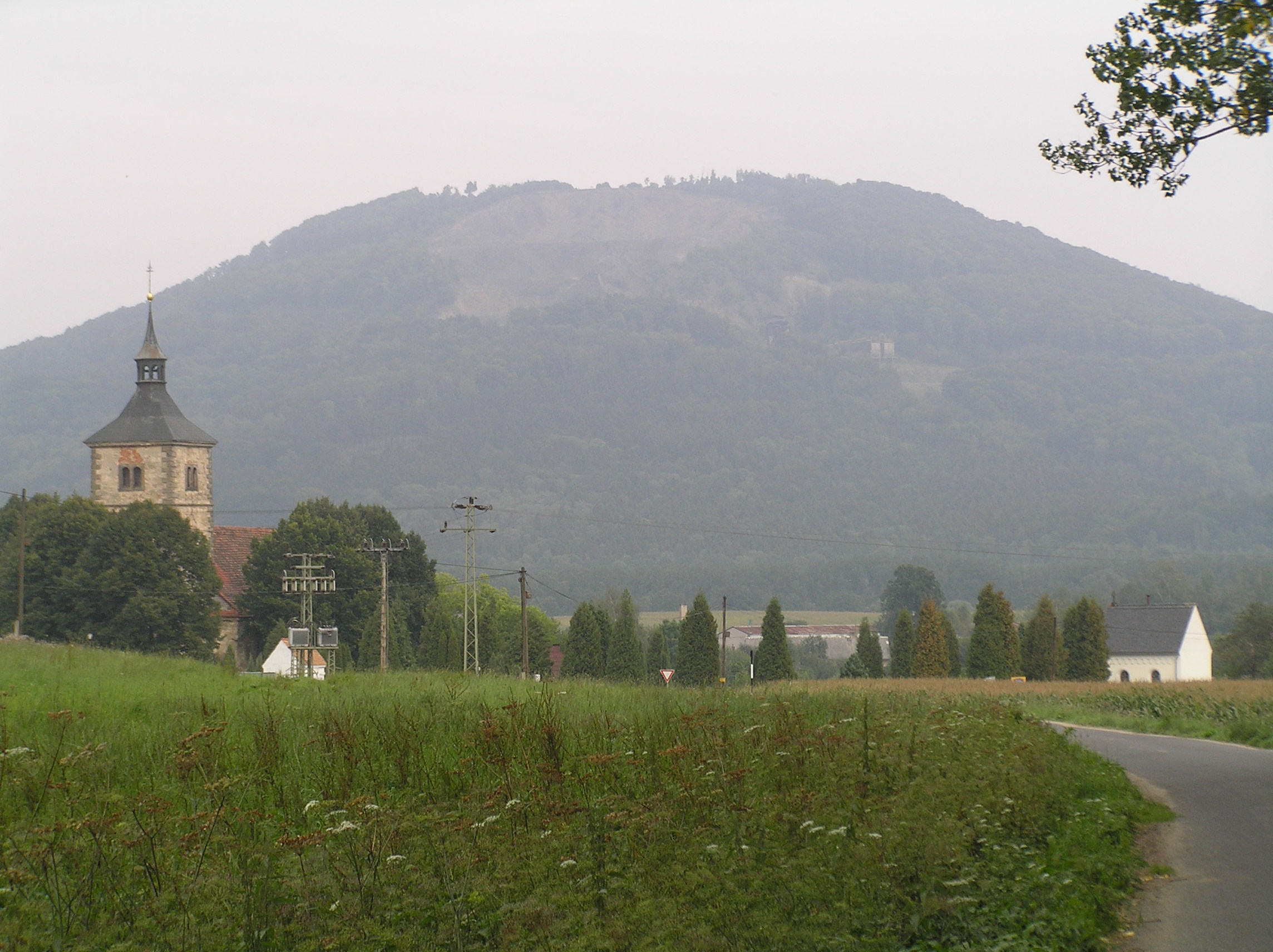 obec Brniště s vrchem Tlustec (591 m n. m.)